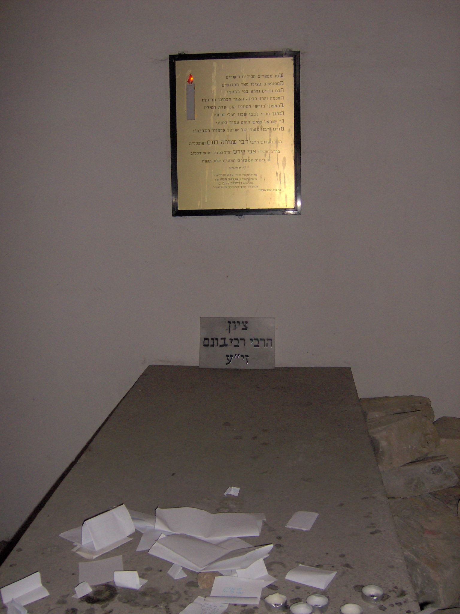 קברו של שמחה בונים מפשיסחא. פשיסחא, פולין.